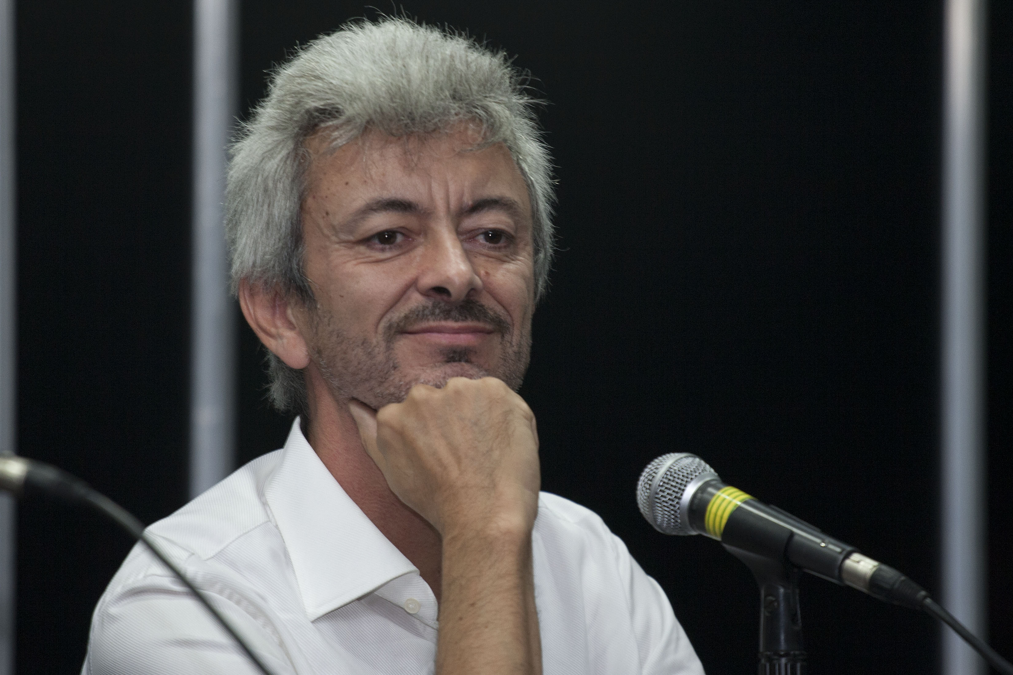 Domingo, 3 de Mayo 2015. En el marco de la 41a Feria Internacional del Libro de Buenos Aires se realizó la charla La Novela Negra, con los autores Paco Ignacio Taibo II y Carlos Gamerro, en el Salón Francisco Gabilondo Soler del Pabellón Amarillo. Foto: Antonio Nava / Secretaría de Cultura Ciudad de México.